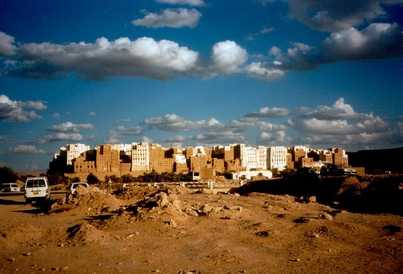 Ansicht der Stadt Shibam, Jemen